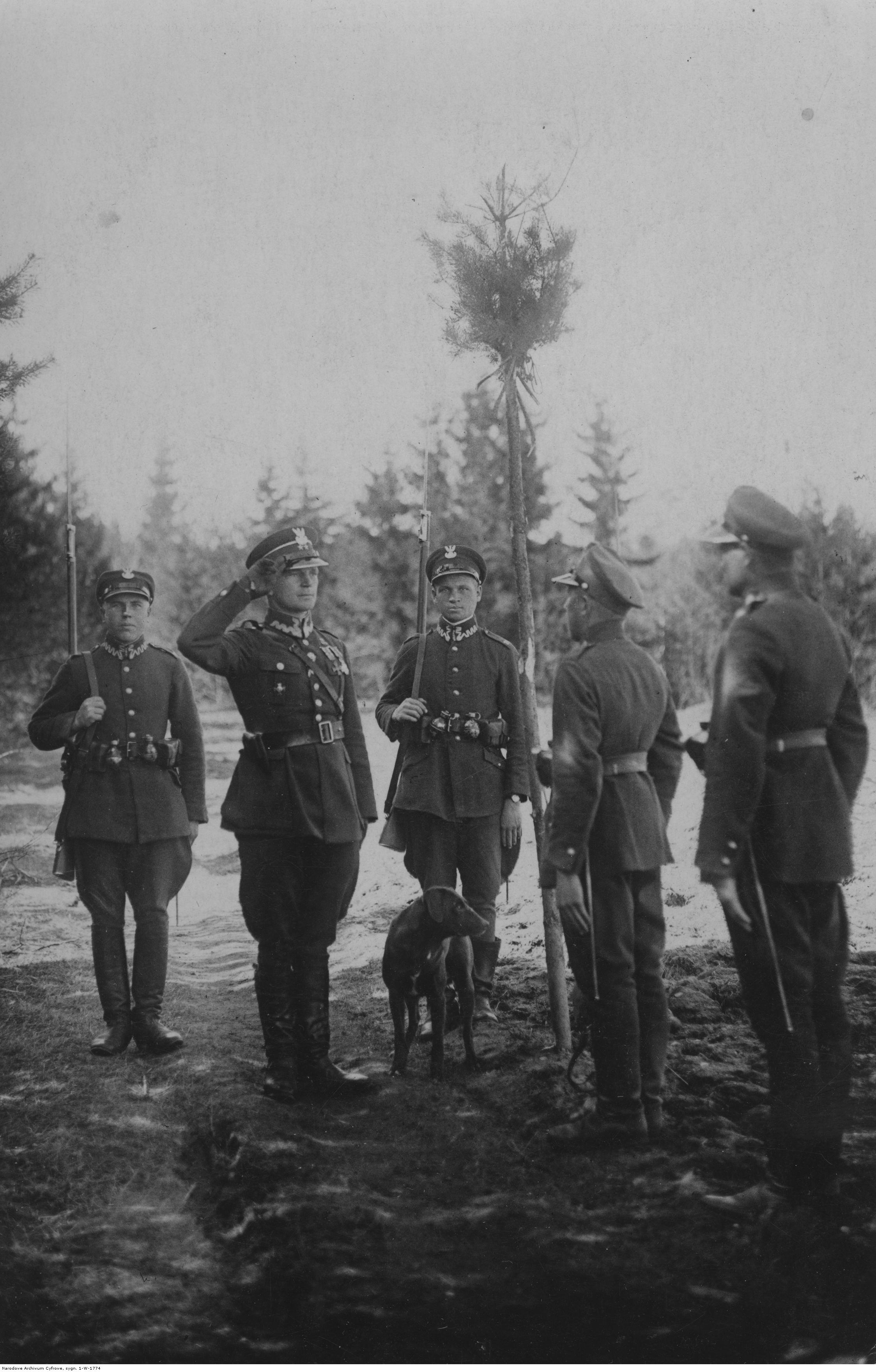 Patrol Batalionu Korpusu Ochrony Pogranicza "Nowe Święciany". Kontrola patrolu na granicy przez dowódcę plutonu por. Kuleszę przy wiesze granicznej; 1928 r. Koncern Ilustrowany Kurier Codzienny - Archiwum Ilustracji